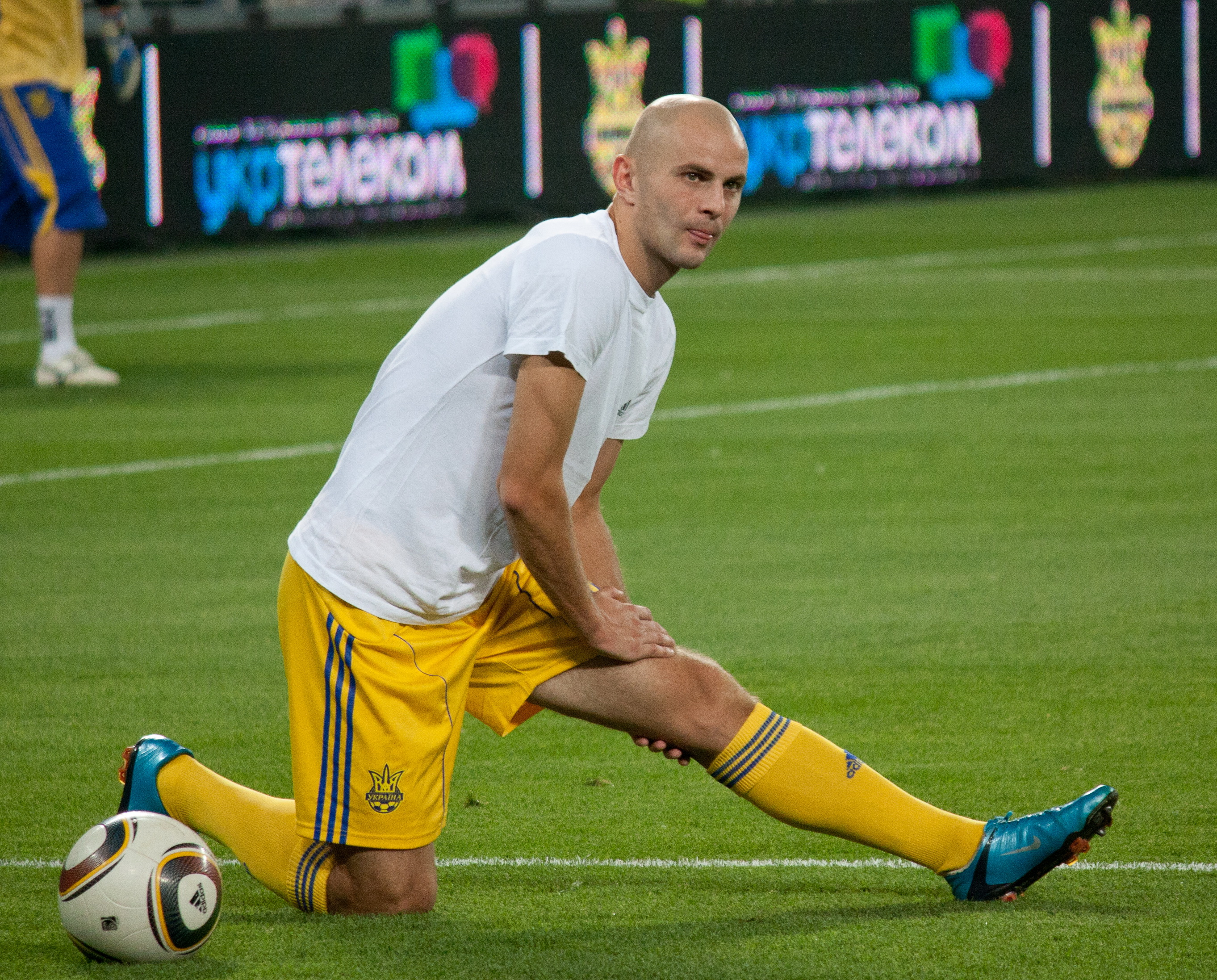 Перед матчем Украина-Голландия